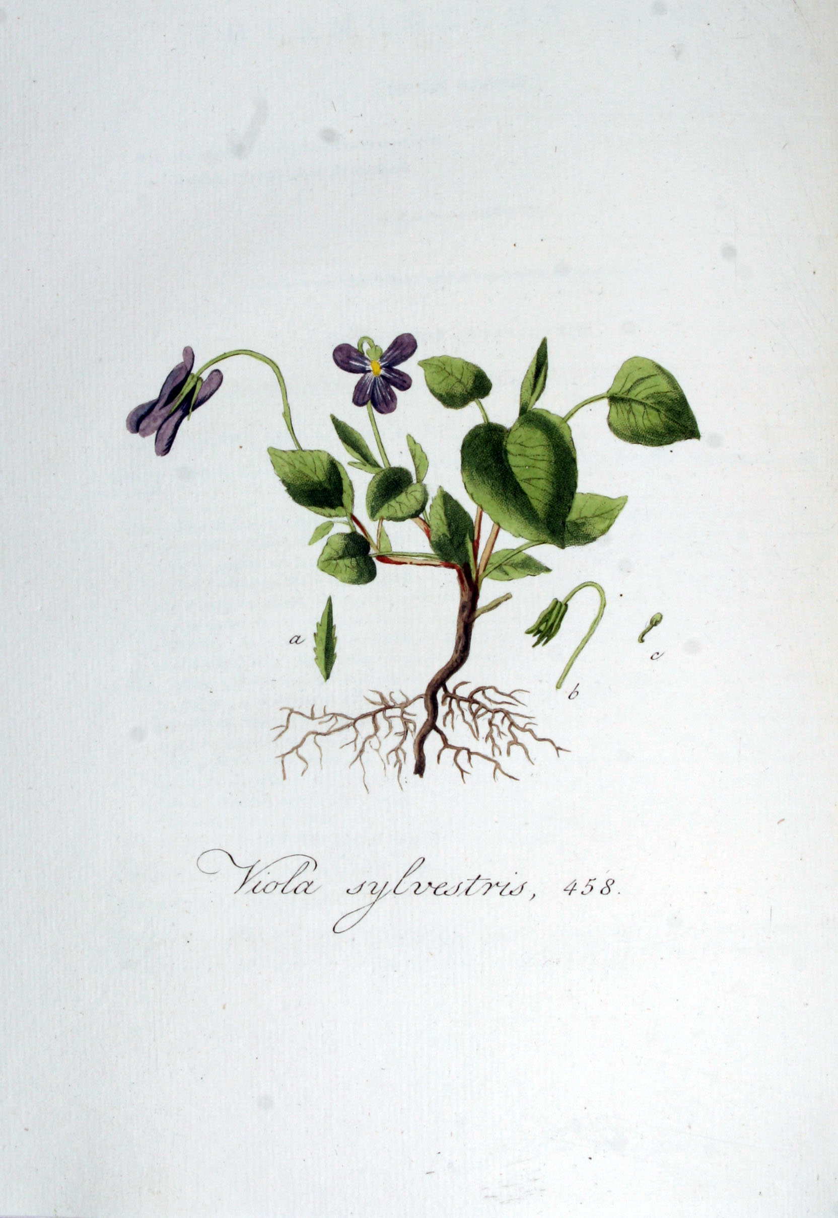 Viola reichenbachiana Jord. ex Boreau (Syn. Viola sylvestris Lam. pro parte)